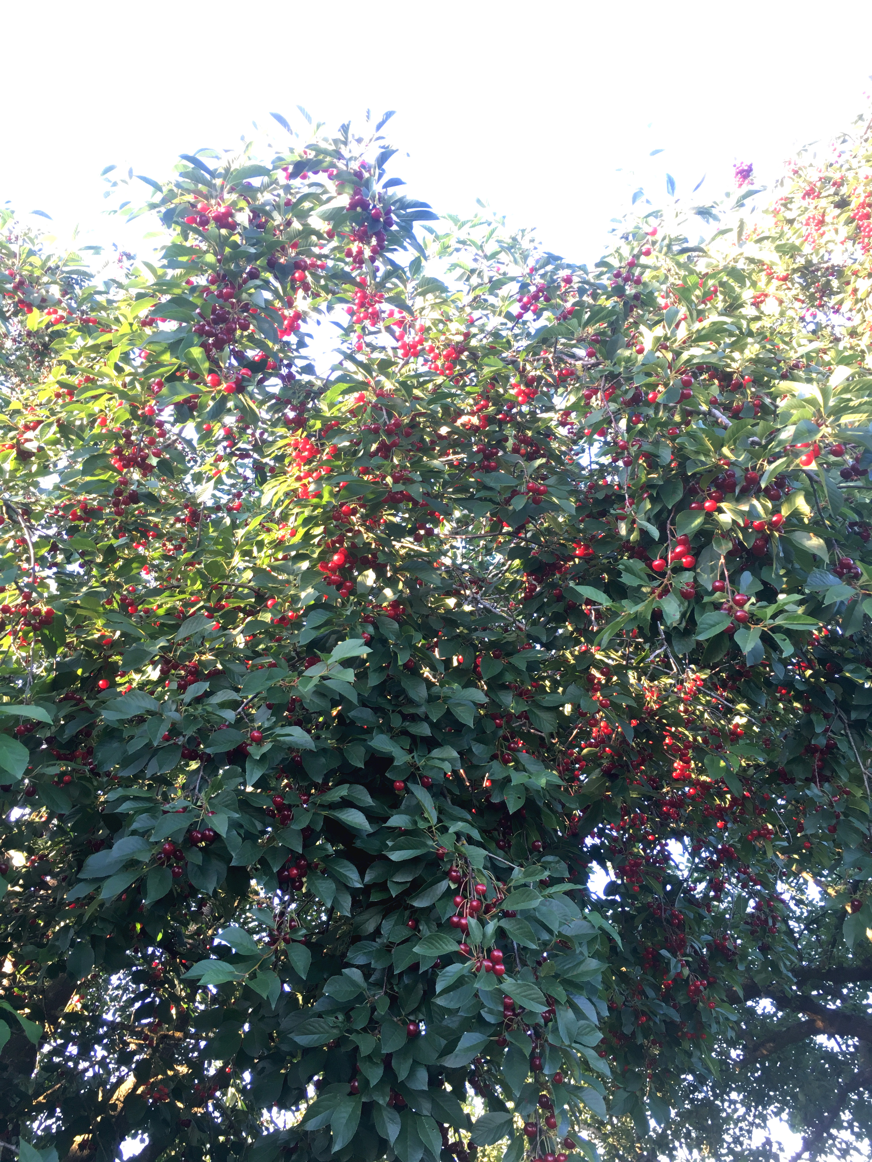 Alter Weinweichselbaum (Hochstamm) voller Sauerkirschen